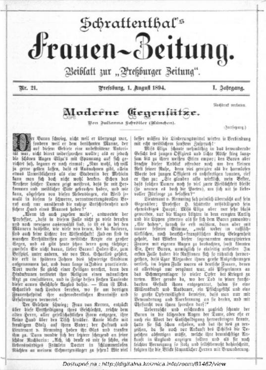 Nemecký ženský a rodinný časopis, ktorý vychádzal v Bratislave na konci 19. storočia.